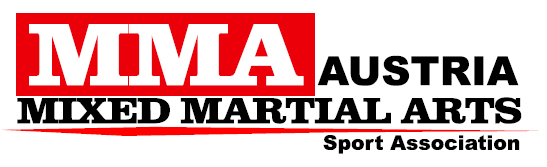 Logo MMA Austria